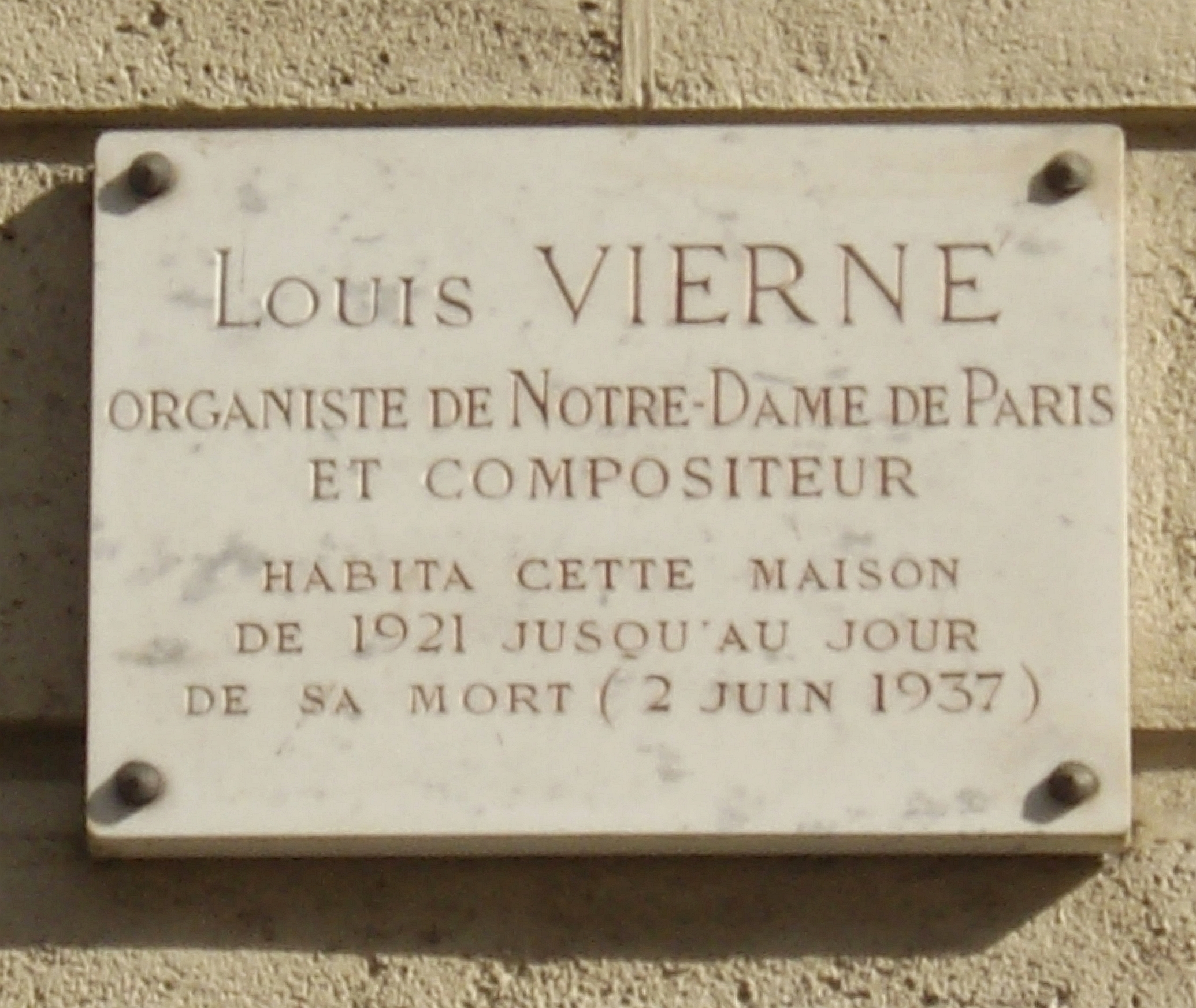 Plaque commémorative, 37 rue Saint-Ferdinand, Paris 17e. « Louis Vierne, organiste de Notre-Dame de Paris et compositeur, habita cette maison de 1921 jusqu'au jour de sa mort (2 juin 1937). »